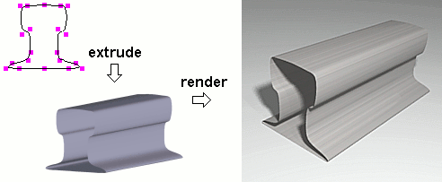 3d-demonstratie extrude, eigen werk, gemaakt met open source programma "Art Of Illusion"